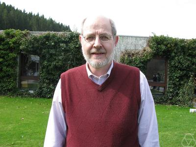 Foto di Ronald G. Douglas